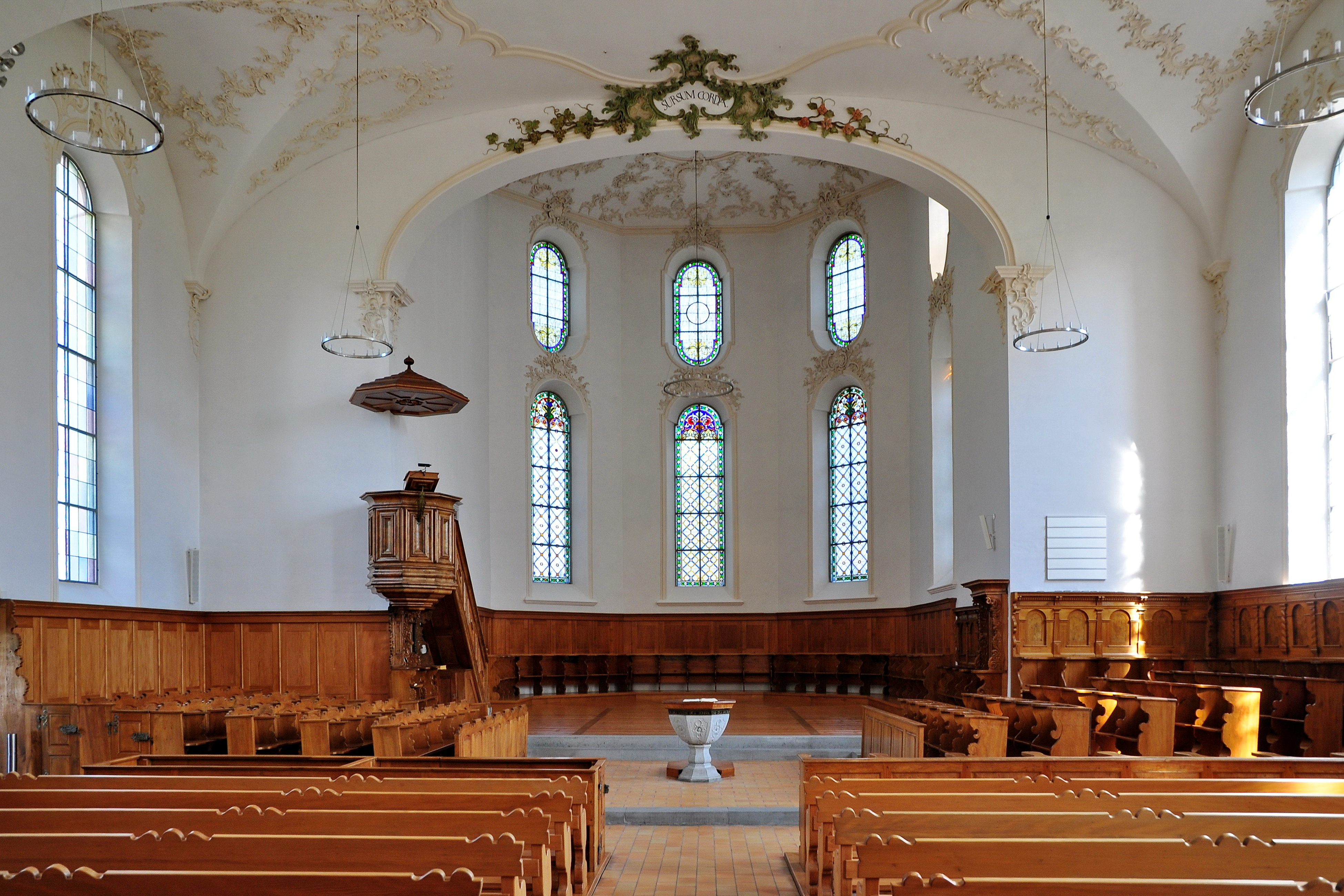 Reformierte Kirche, Oetwilerstrasse in Hombrechtikon (Switzerland)